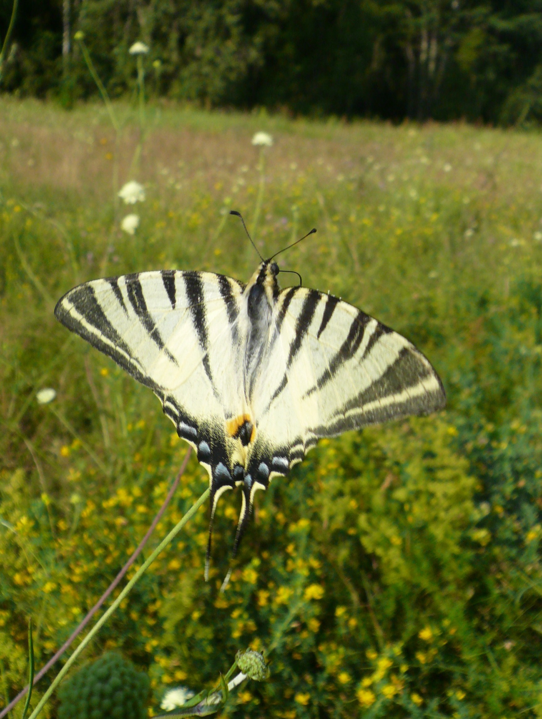 Paź żeglarz na poligonie WAT